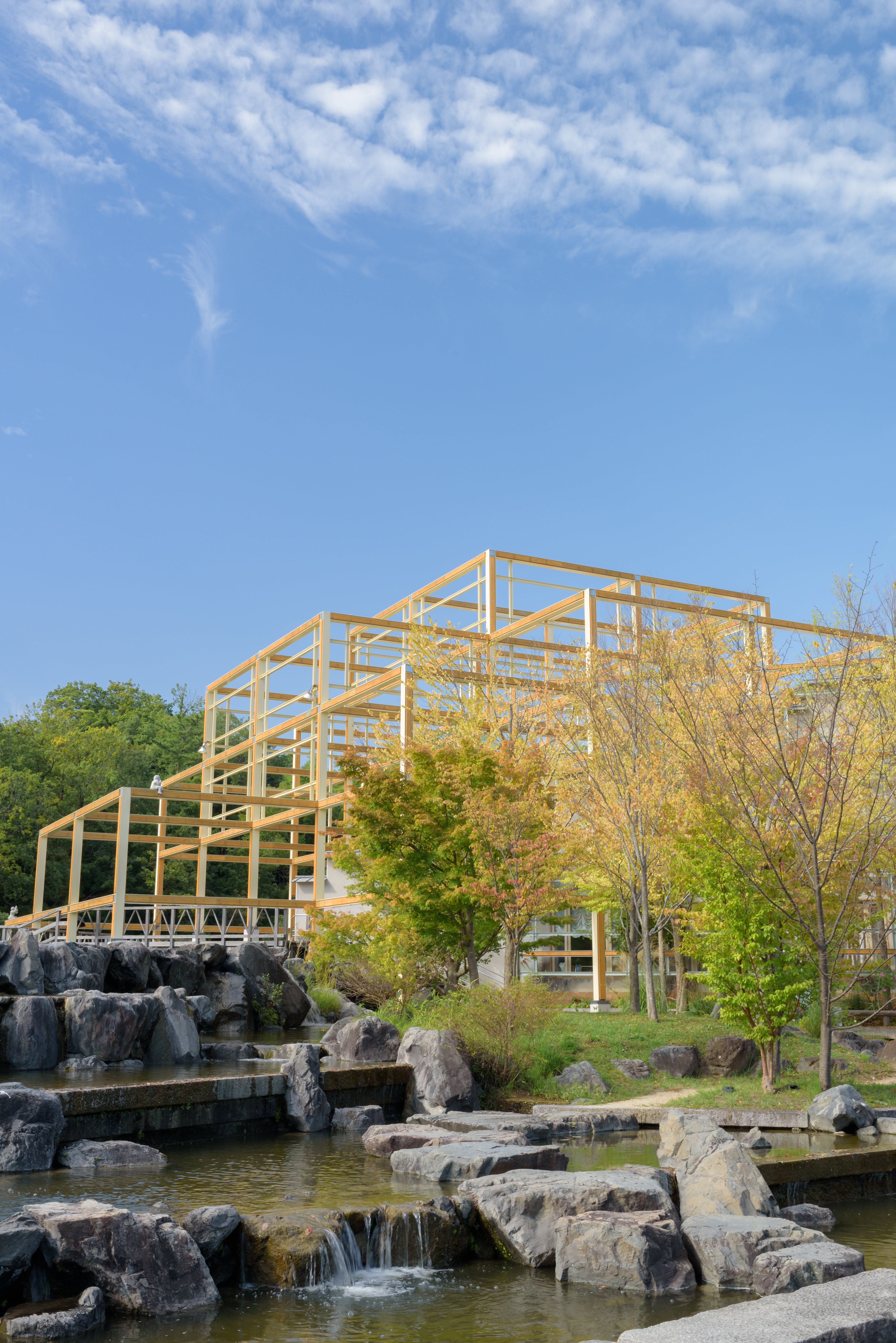 けいはんな記念公園水景園